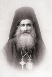 Амвросиос Ставрианос